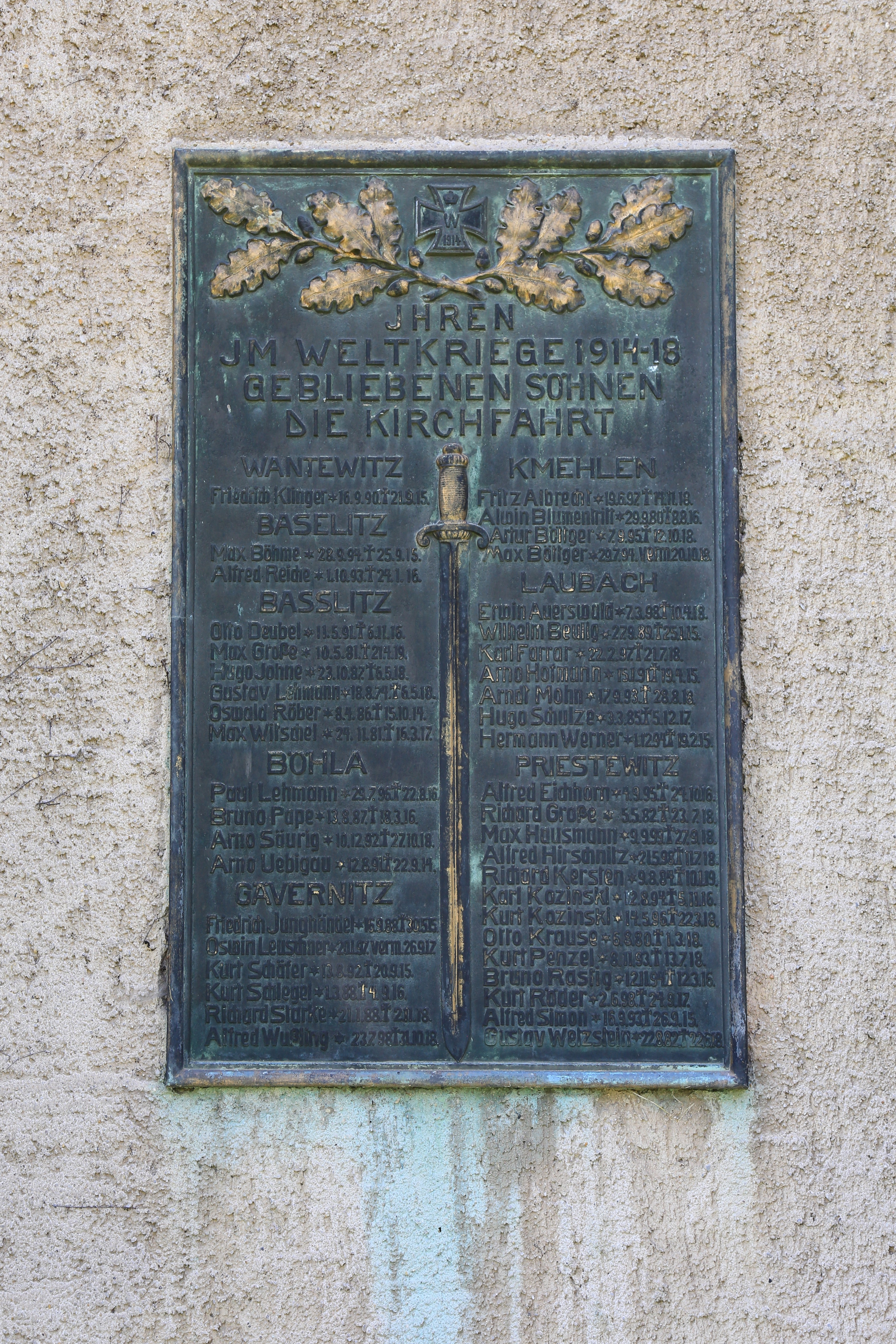 Kirche Wantewitz August 2017 (10)